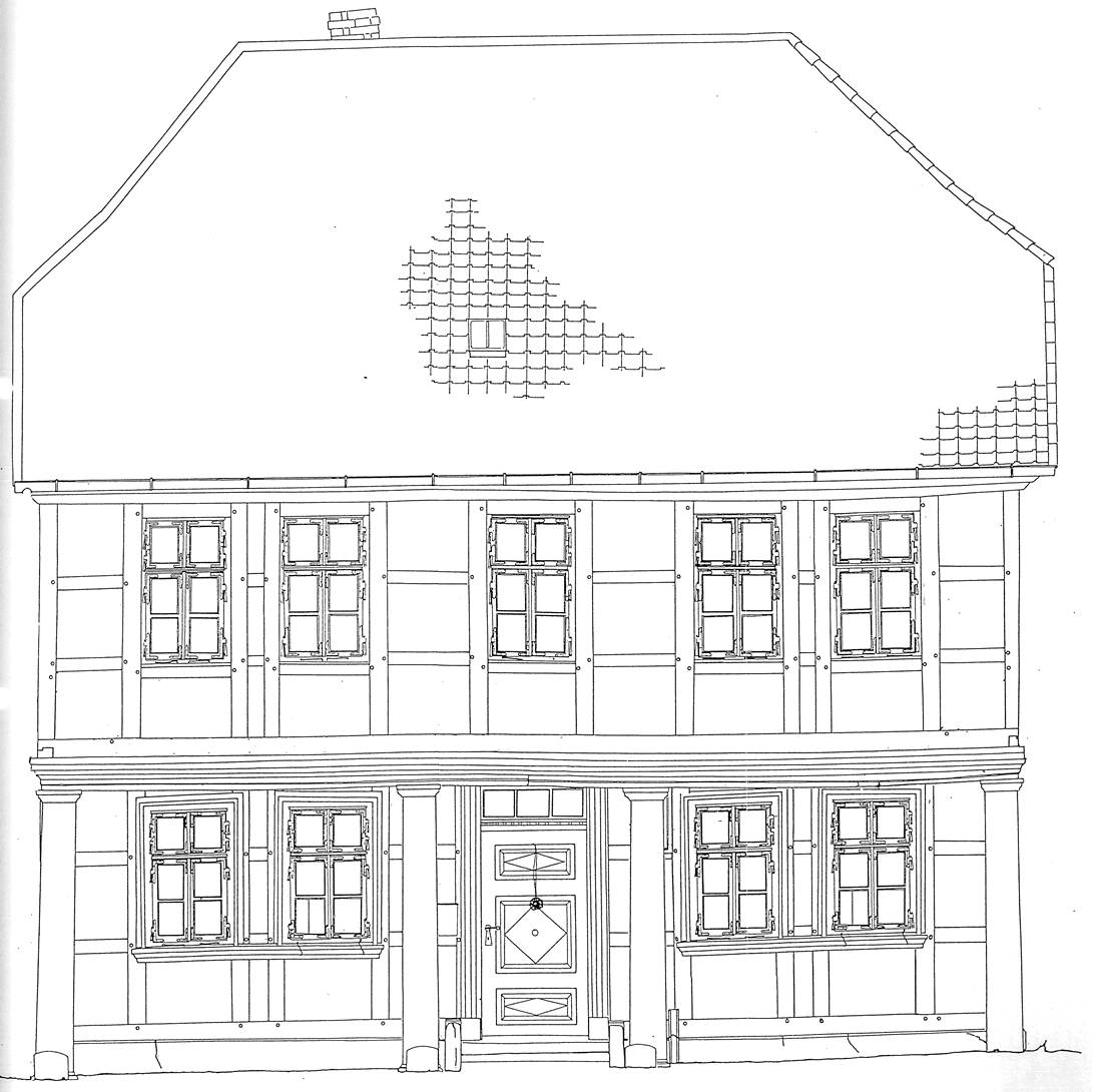 Frontsicht, Altes Zollhaus Wennigsen (Deister)